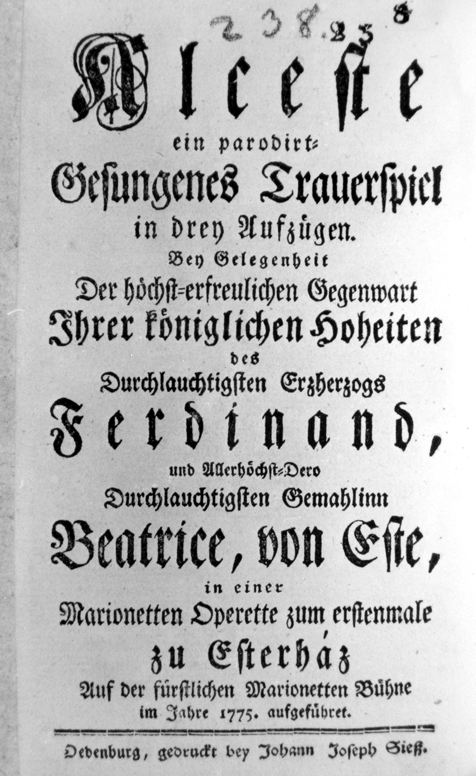 „Alceste“, Marionettenoper von Karl von Pauerspach für Ezterház – Titelblatt des Textbuches, Ödenburg 1775, Exemplar der Wienbibliothek, Wien; Foto: Wienbibliothek, Wien.